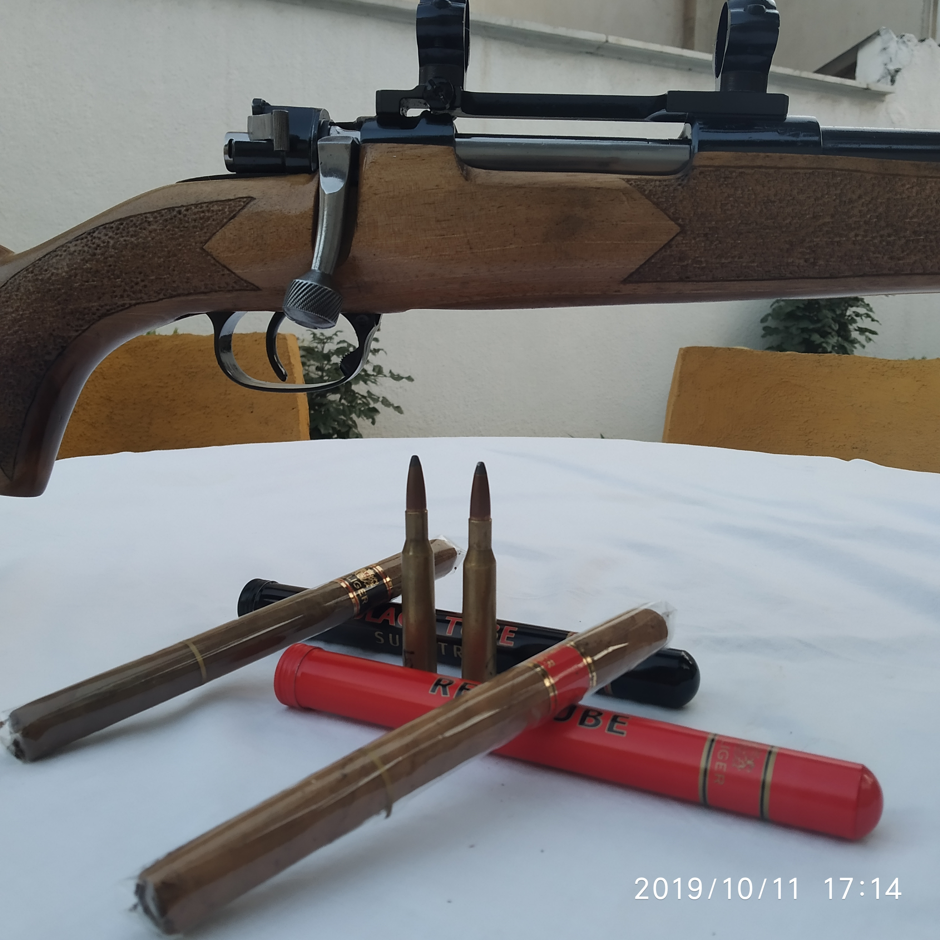 در اسلحه نخجیر 3 از کپ و مکانیزم گلن گدن ماوزر یا همان برنو استفاده شده است